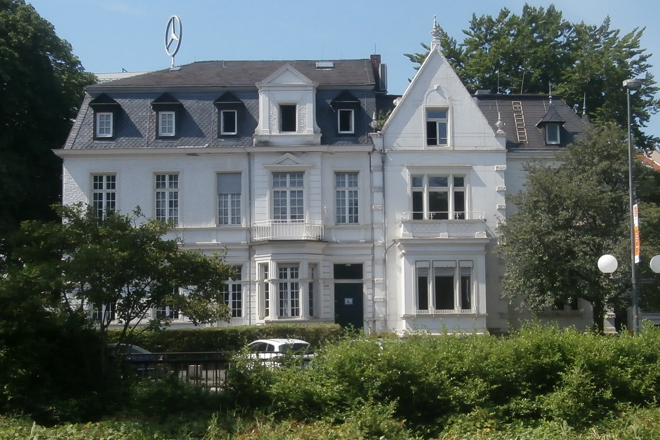 Villengruppe, Adenauerallee 212/214, Bonn